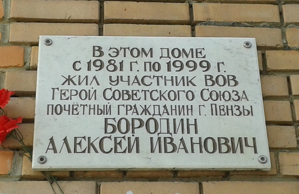 Мемориальная доска Герою Советского Союза Бородину Алексею Ивановичу на жилом доме по адресу: г. Пенза, ул. Московская, 40.